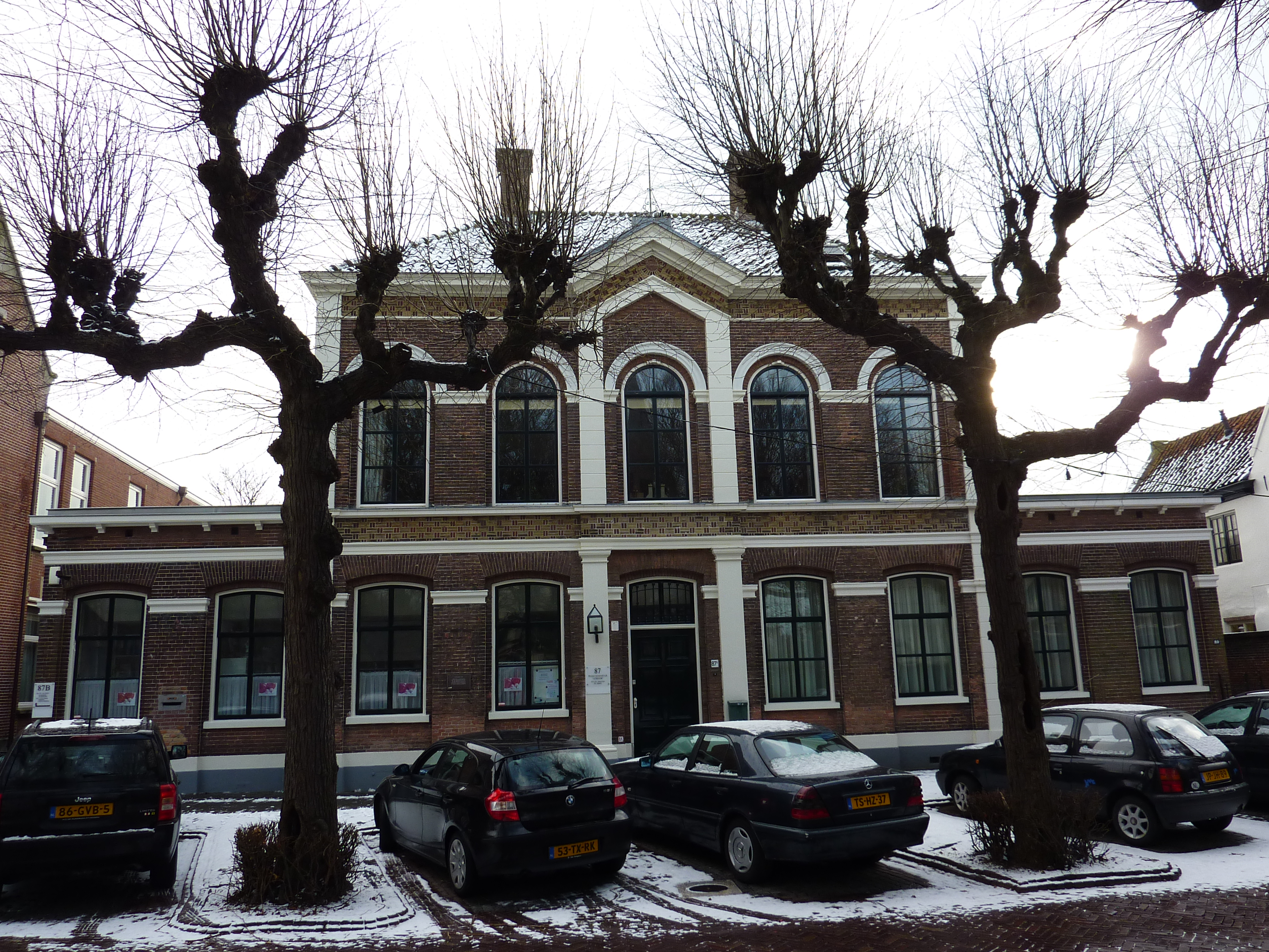 Noordwijk, Voorstraat 87